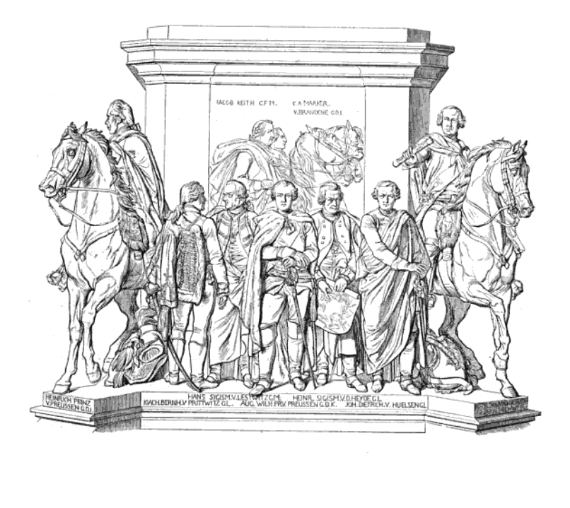 Zeichnung der Figurengruppe am Reiterdenkmal Friedrich II. unter den Linden Figurengruppe: Johann Dietrich von Hülsen, Heinrich Sigesmund von der Heyde, August Wilhelm von Preußen, Hans Sigesmund von Lestwitz, Joachim Bernhard von Pritzwitz, Hintergrund: Jacob Keith, Markgraf, Karl Albrecht von Brandenburg-Schwedt